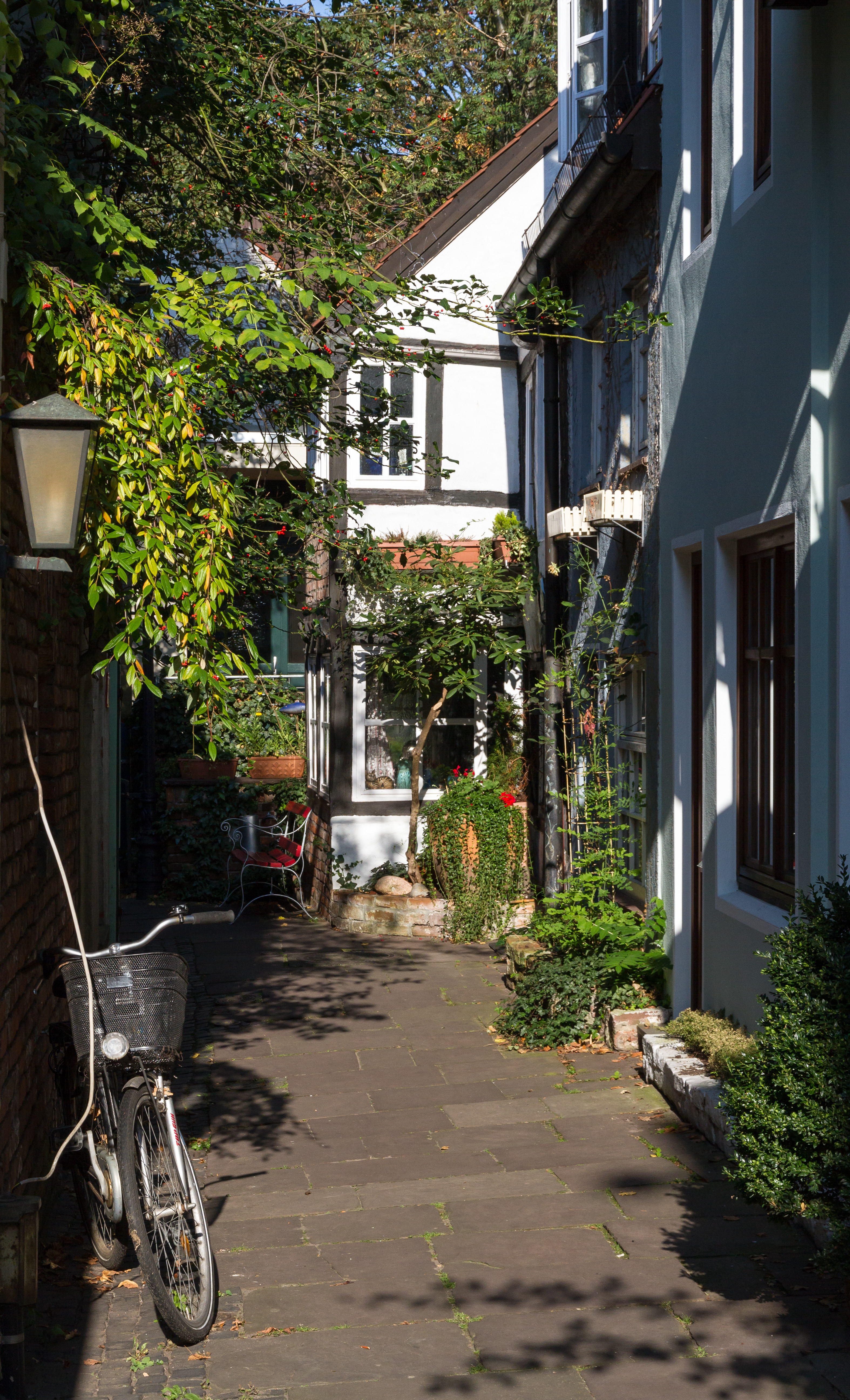 Schnoorviertel in Bremen, Hinter der Balge 10 (Haus in Bildmitte)Das abgebildete Objekt ist ein geschütztes Kulturdenkmal in der Freien Hansestadt Bremen, mit der Nr. 1382 beim Landesamt für Denkmalpflege registriert.